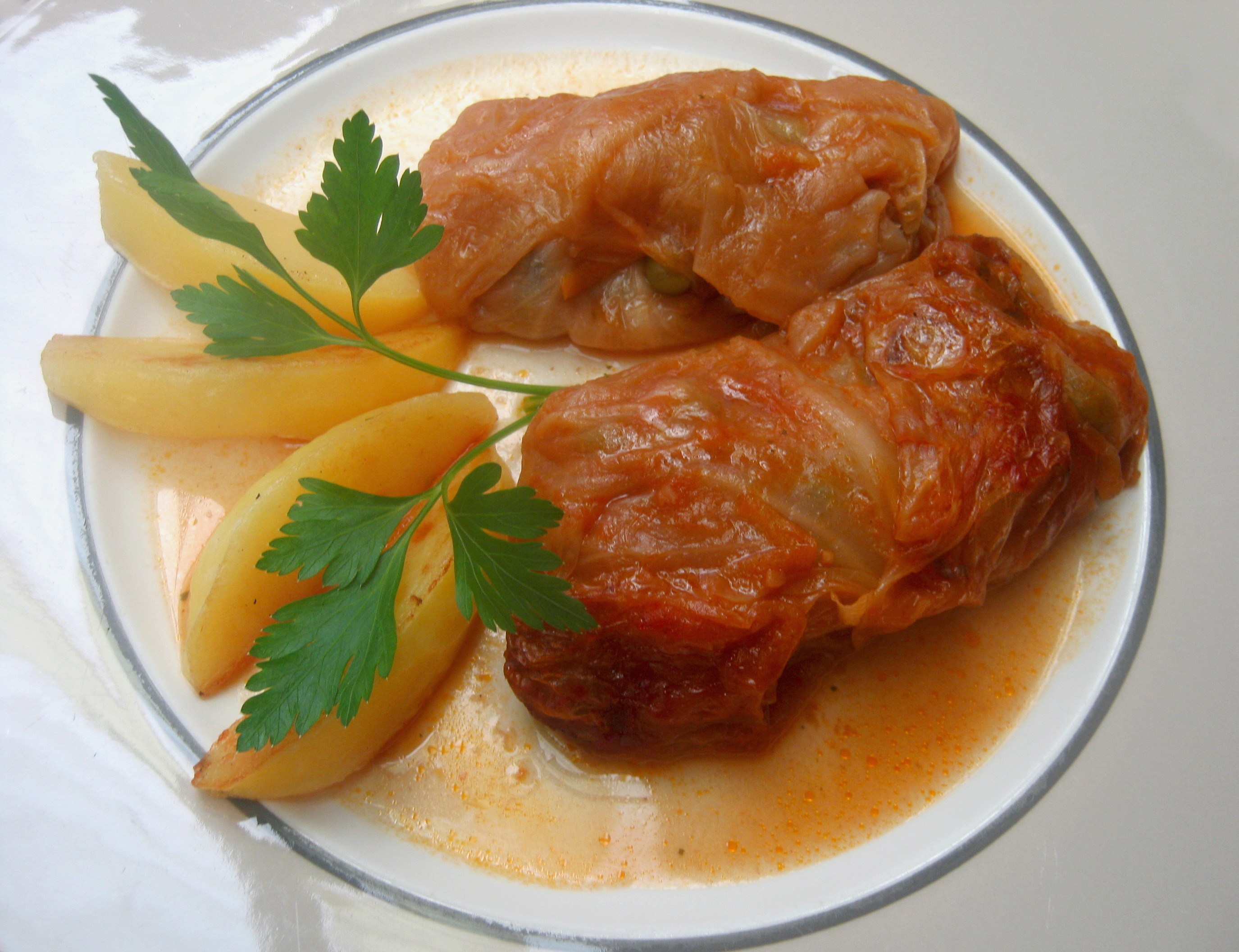 Balandėliai